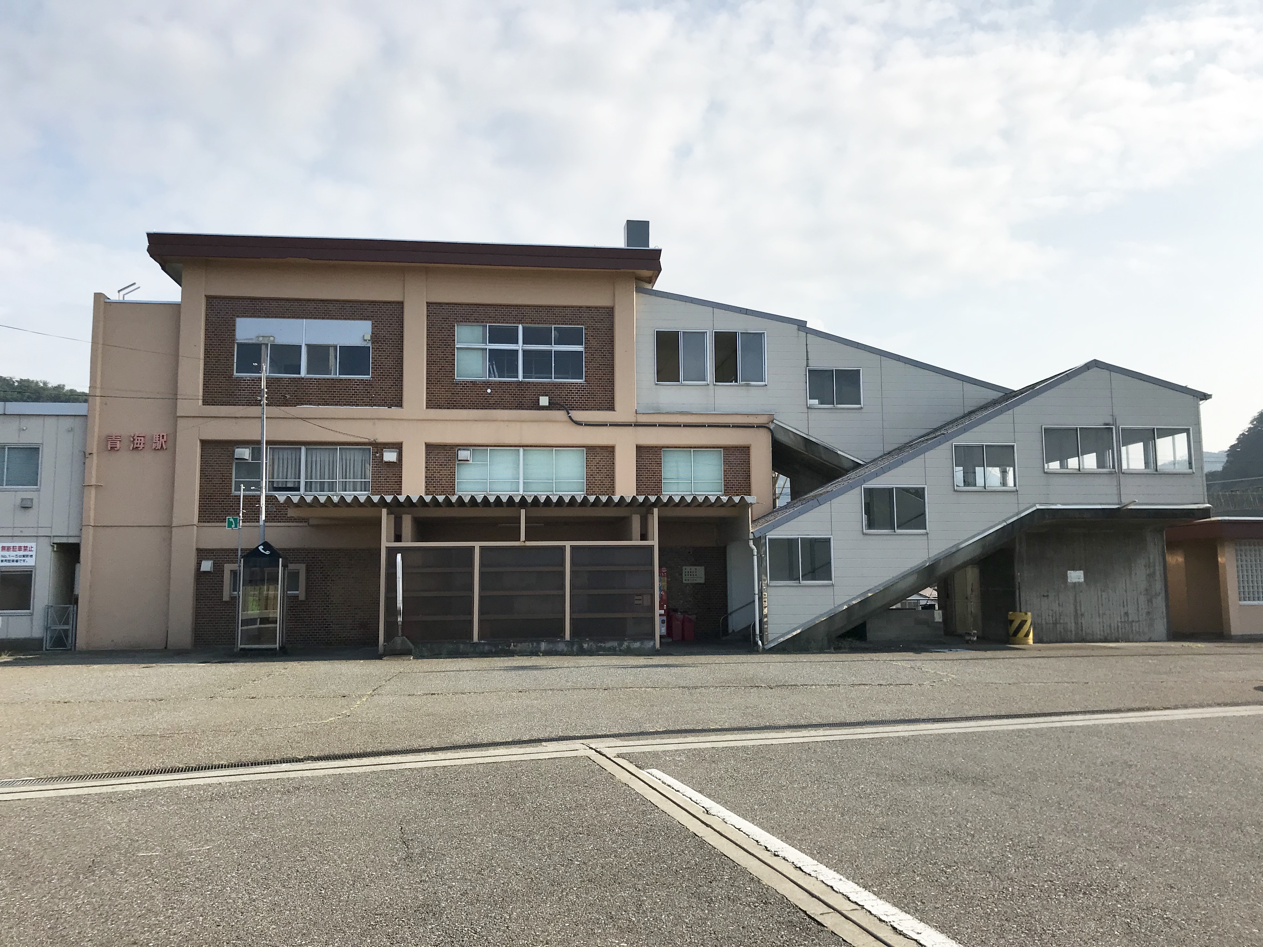 えちごトキめき鉄道日本海ひすいライン青海駅駅舎